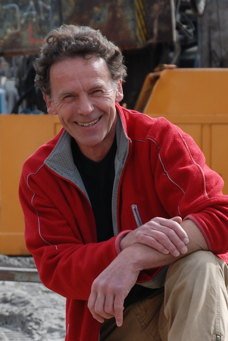 Derk den Boer.